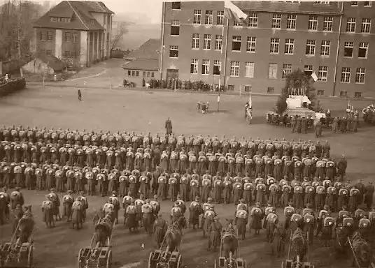 Plac apelowy podczas święta 11 Pułku Piechoty, zdj. wyk. ok 1931